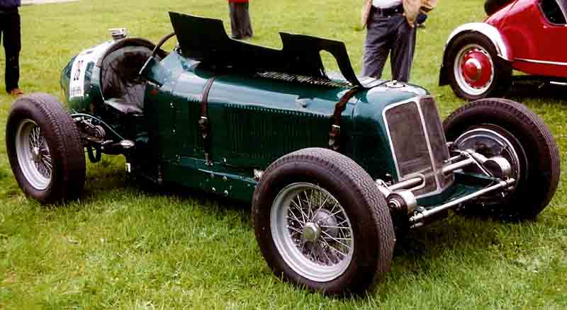 ERA 2-Litre R14B 1937